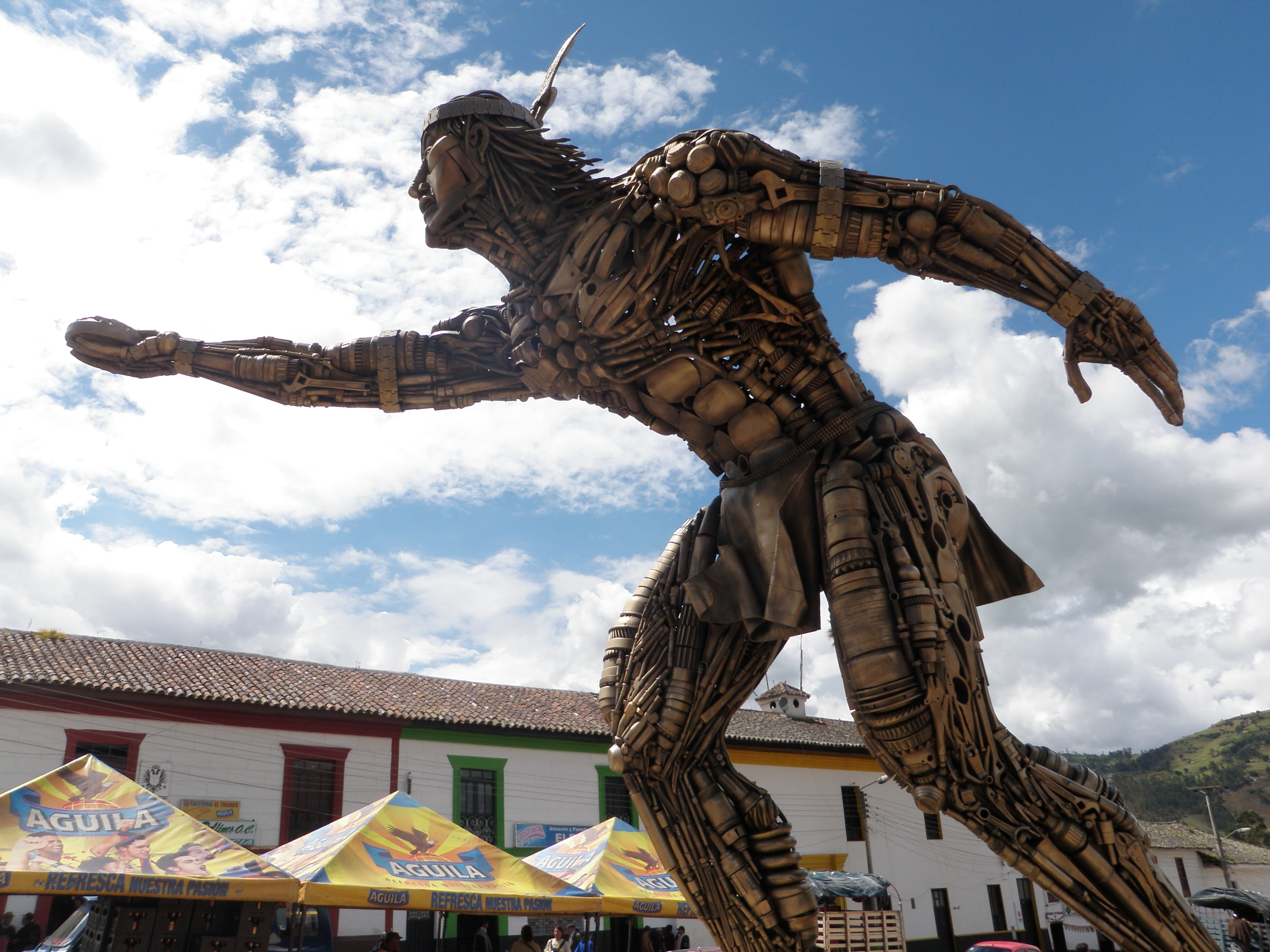 Sector Urbano del Municipio de Turmequé